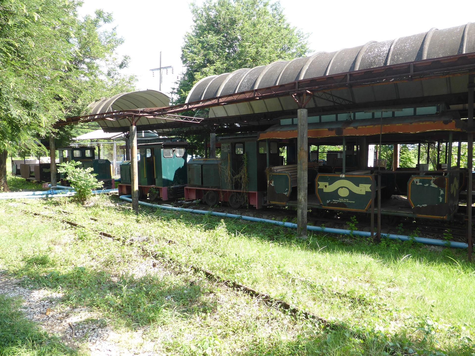 Siam Park City, Bangkok, 10.11.2016